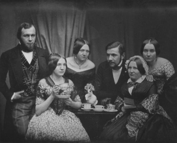 Familie am Kaffeetisch. Daguerreotype, 11,8 x 14,7 cm.